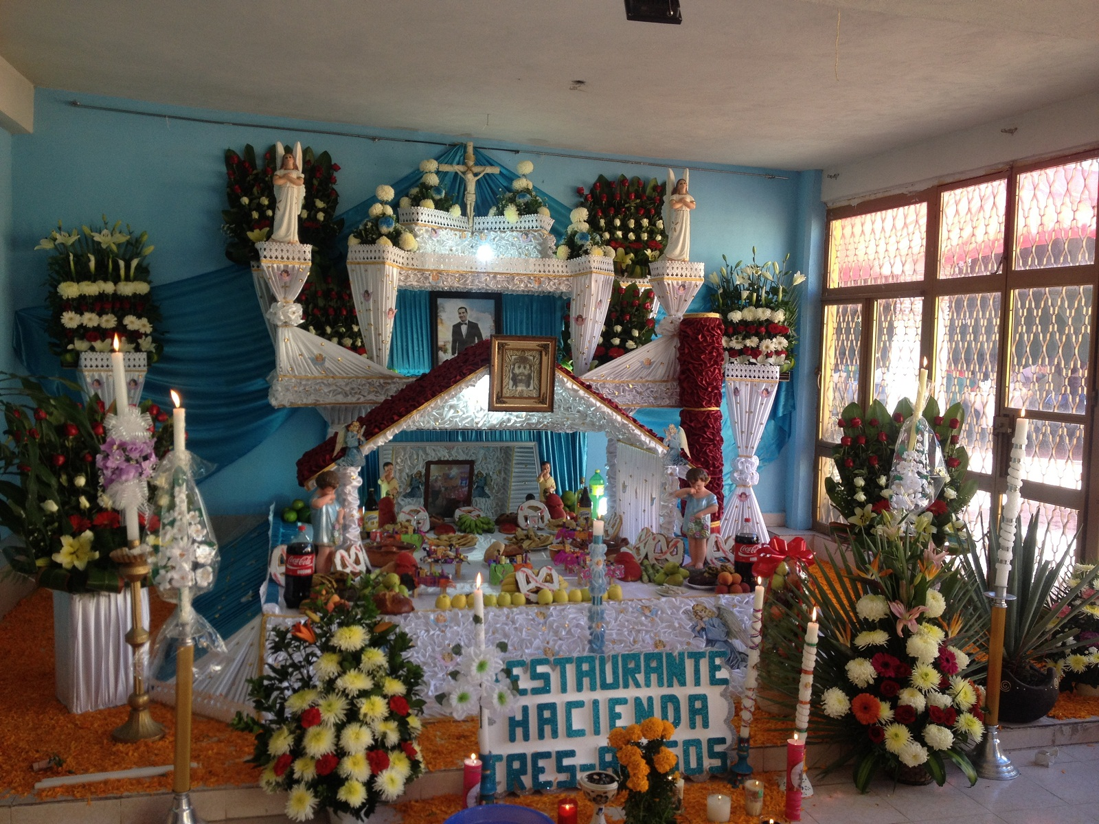 Altar tradicional de Día de Muertos en Huaquechula (Puebla, México).